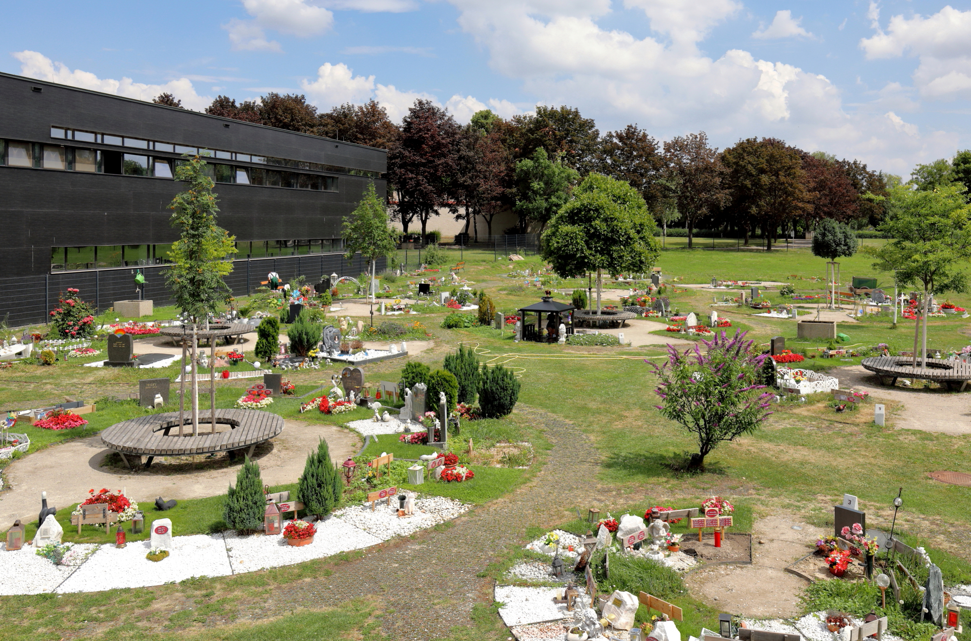 Der Tierfriedhof gegenüber dem Haupttor (Tor 2) des Zentralfriedhofes in der Anton-Mayer-Gasse im 11. Wiener Bezirk Simmering. Der erste und einzige Tierfriedhof Wiens wurde 2011 eröffnet und wird von der „Tierfriedhof Wien GmbH“ betrieben, die wiederum zu 70% zur gemeindeeigenen Friedhöfe Wien GmbH gehört. Je 15% halten die „ebswien tierservice Ges.m.b.H.Nfg KG“ und die „Reiwag Gebäudeservice GmbH“. Auf 2.500 m² sind in kreisförmigen Gräberfeldern insgesamt mehrere hundert Erdgräber in verschiedenen Größen und Urnengräber beheimatet. Zur würdevollen Verabschiedung steht unter anderem eine Aufbahrungshalle zur Verfügung.